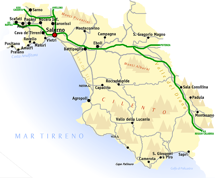 Kaart van de provincie Salerno